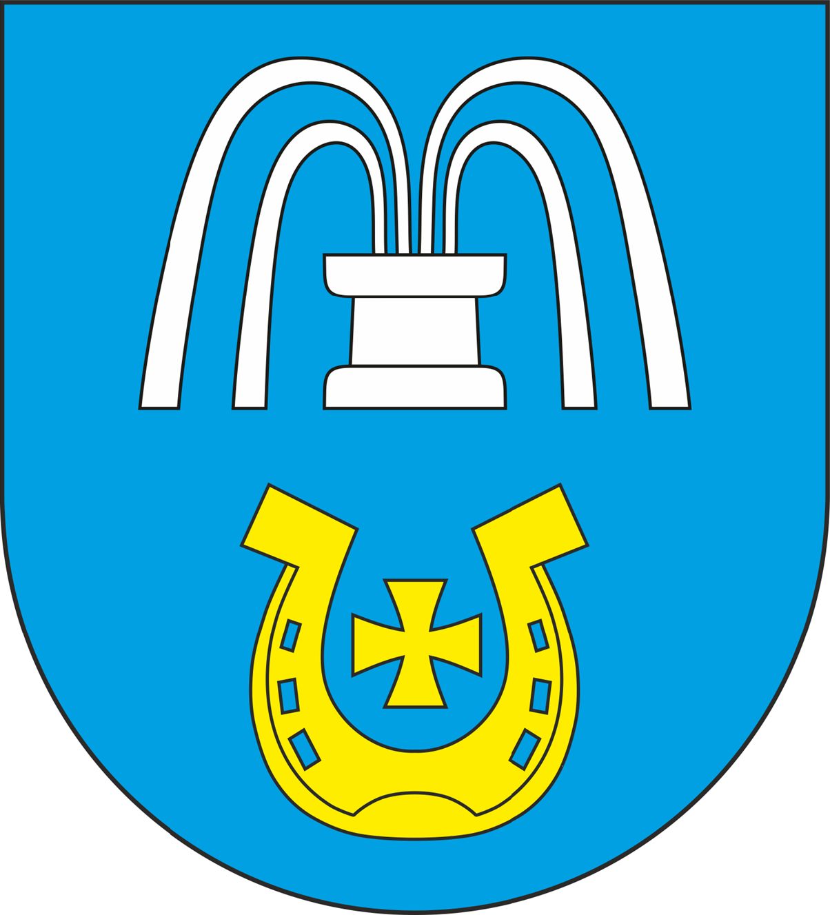 Herb gminy Solec-Zdrój